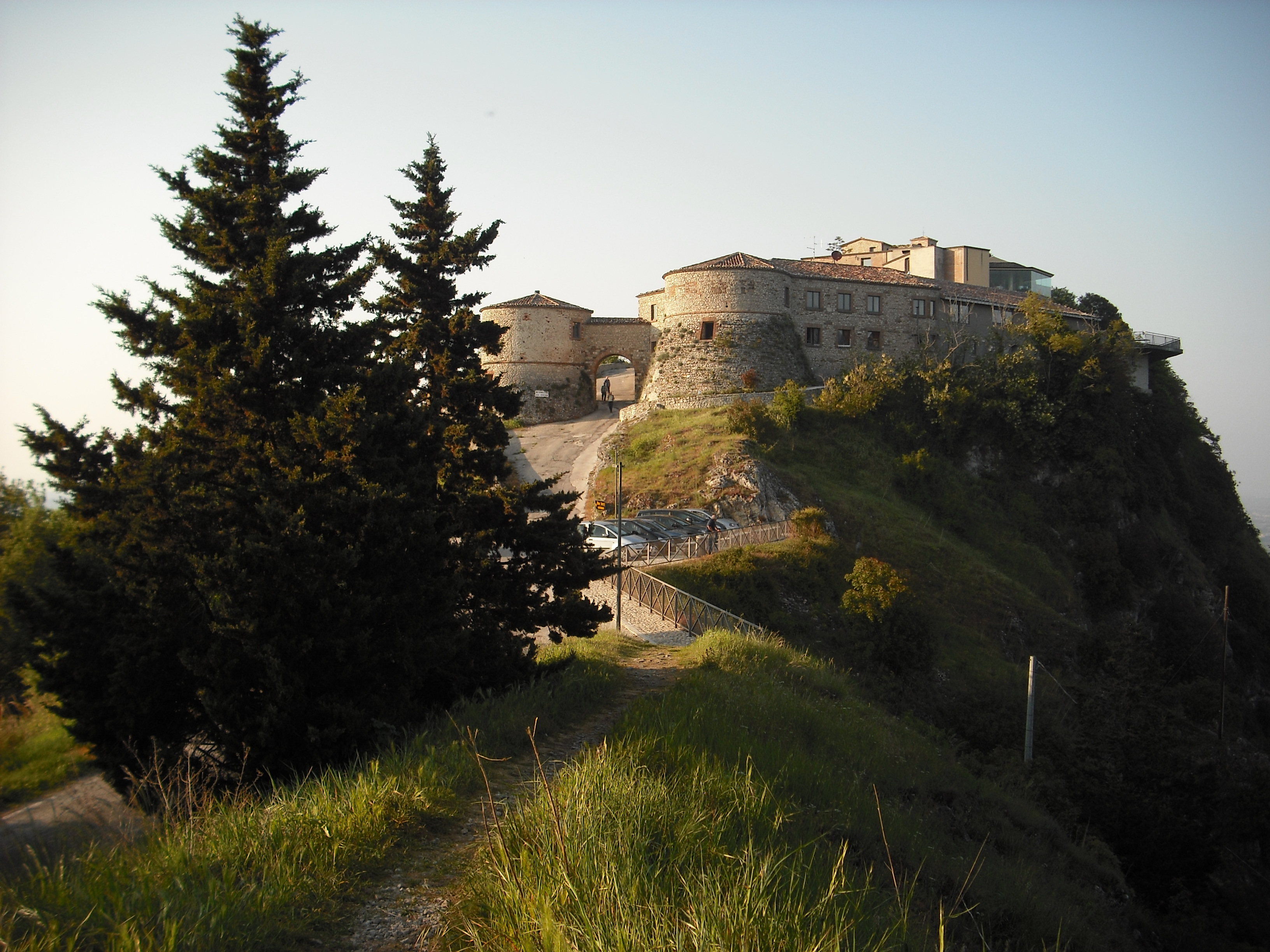 Immagine della Rocca di Torriana fotografata nel maggio 2011.